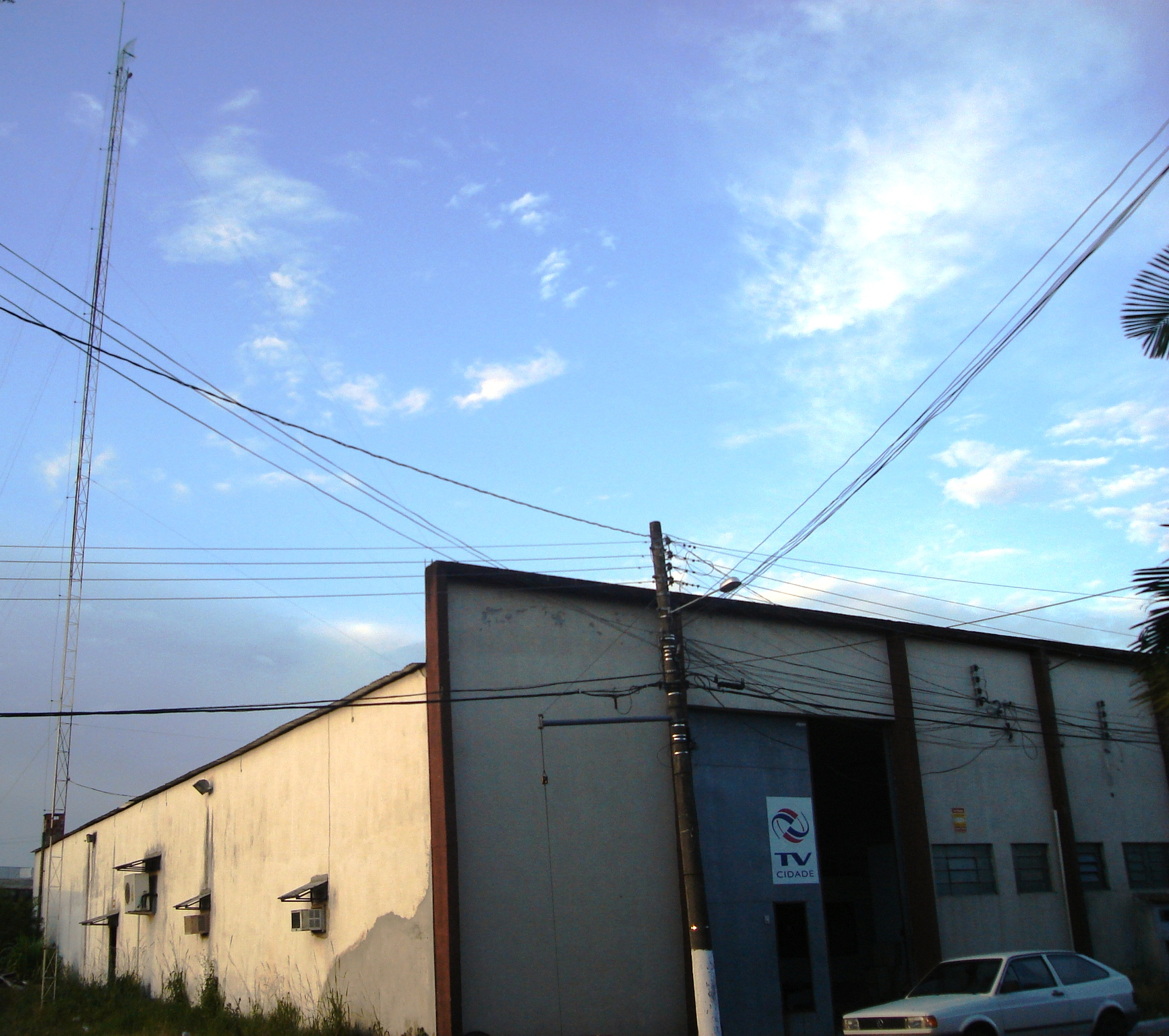 Sede da TV Cidade de Pelotas, RS.